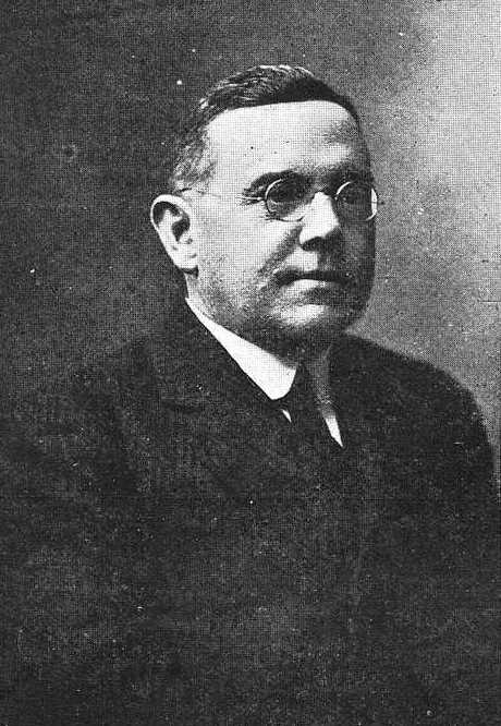 José Barreras Massó, fotografía en Vida Gallega 1922